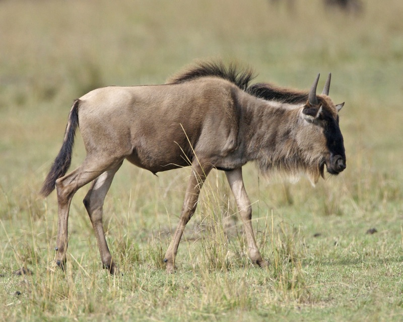 Blue Wildebeests Connochaetes taurinus Masai Mara, Kenya August 2008